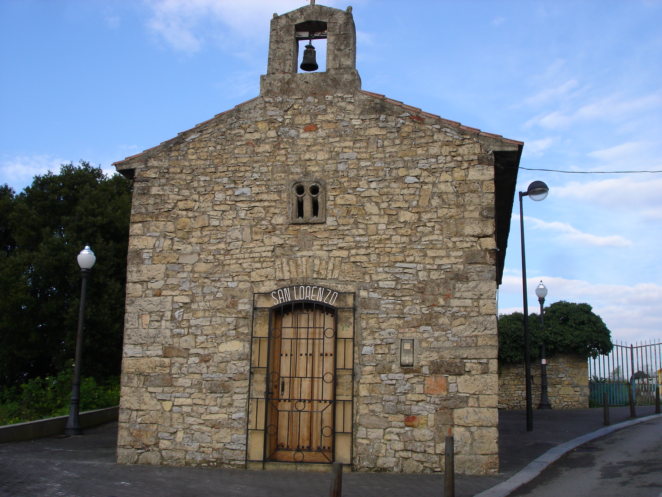 CapilladeSanLorenzo